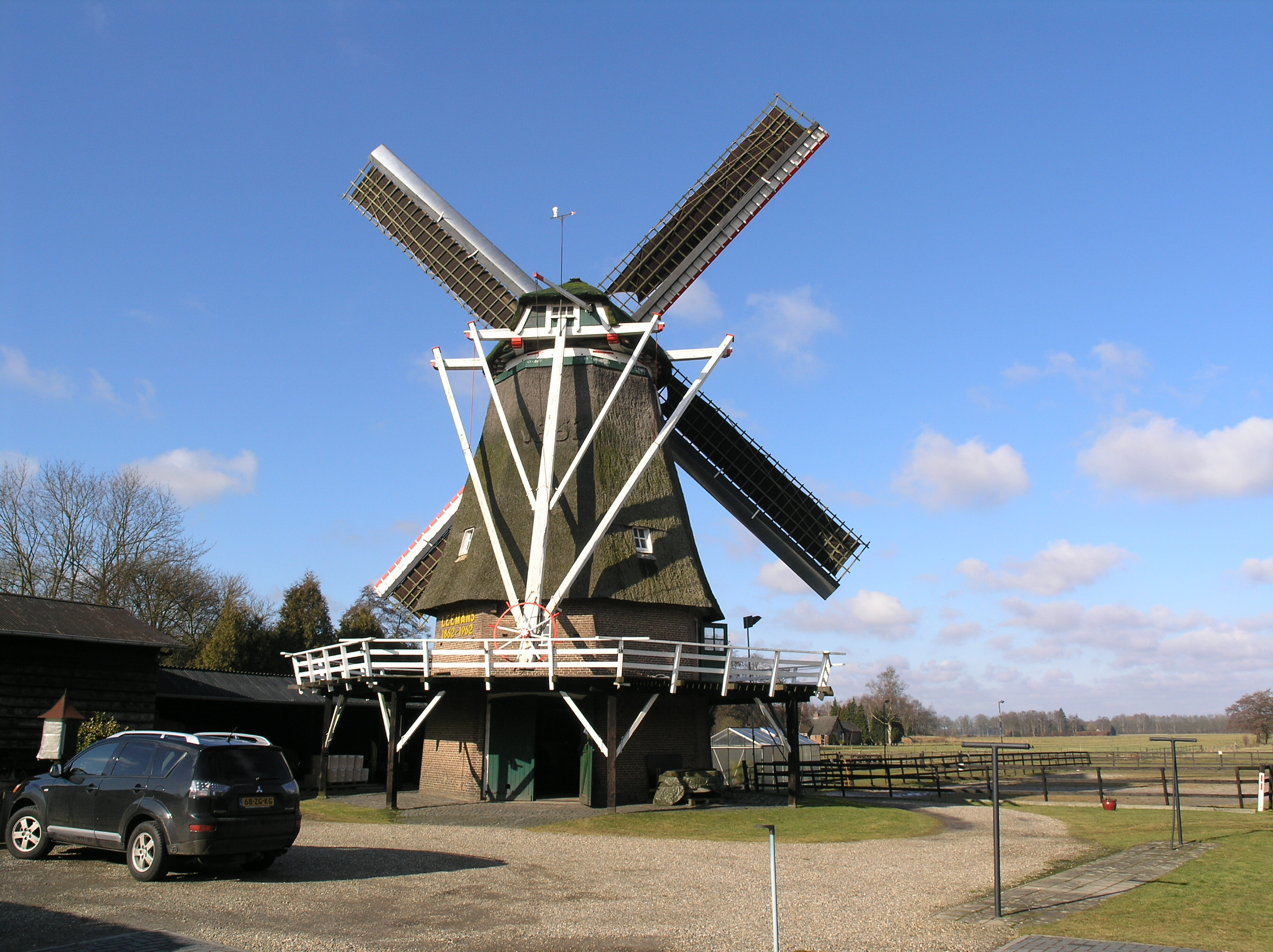 Vriezenveen Stellingmolen Leemansmolen